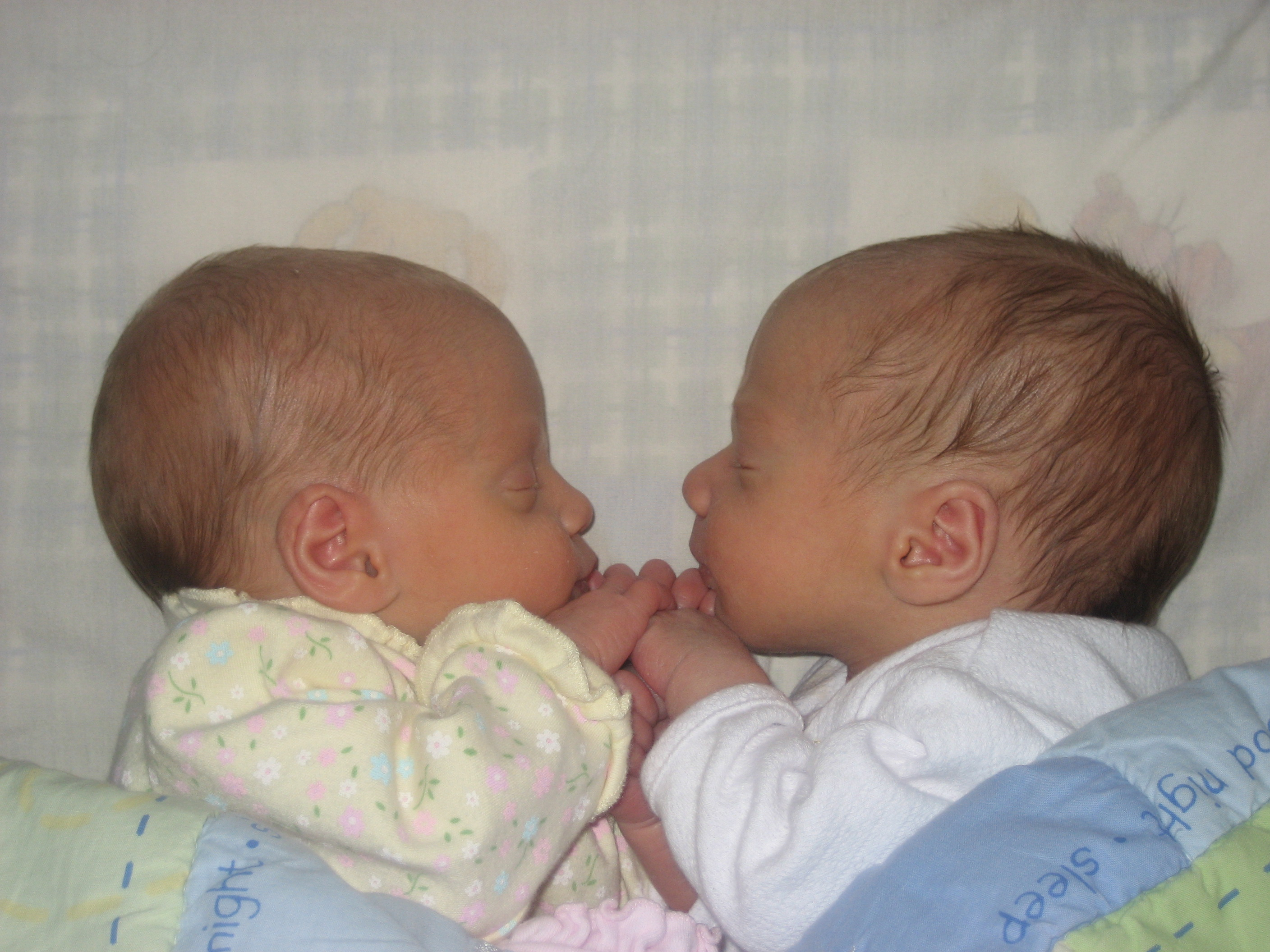 My twins